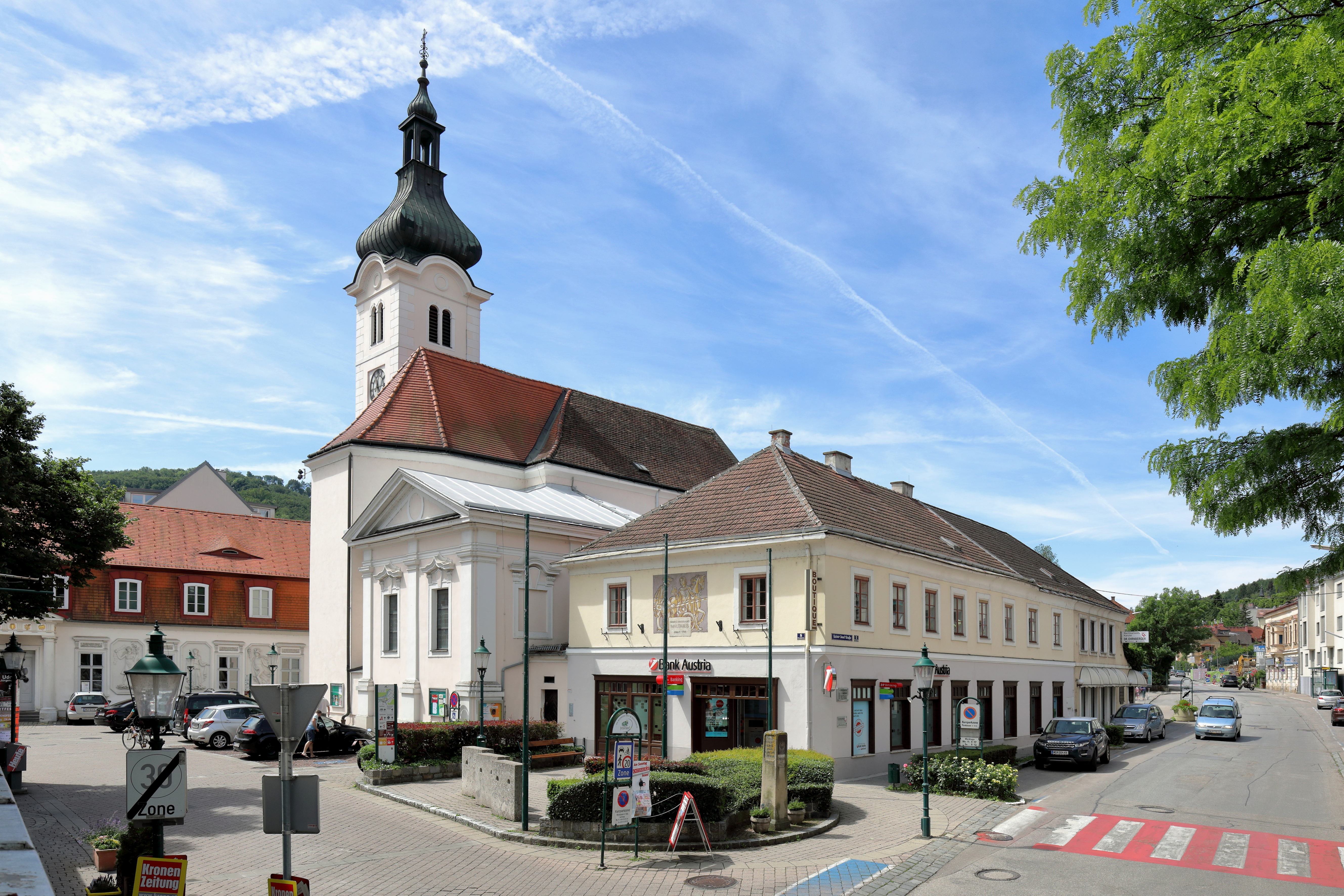 Ortskern der niederösterreichischen Stadtgemeinde Purkersdorf im Bereich Hauptplatz / Kaiser-Josef-Straße.Ganz links die ehemalige Fürnbergsche Poststation (errichtet 1796/97), anschließend die Pfarrkirche mit der 1726 errichteten Sakristei bzw. Schatzkammer. In der Bildmitte das ehemalige kaiserliche Mauthaus (erbaut 1786) und davor ein Meilenstein aus der Mitte des 19. Jahrhunderts mit bronzenem Doppeladler.